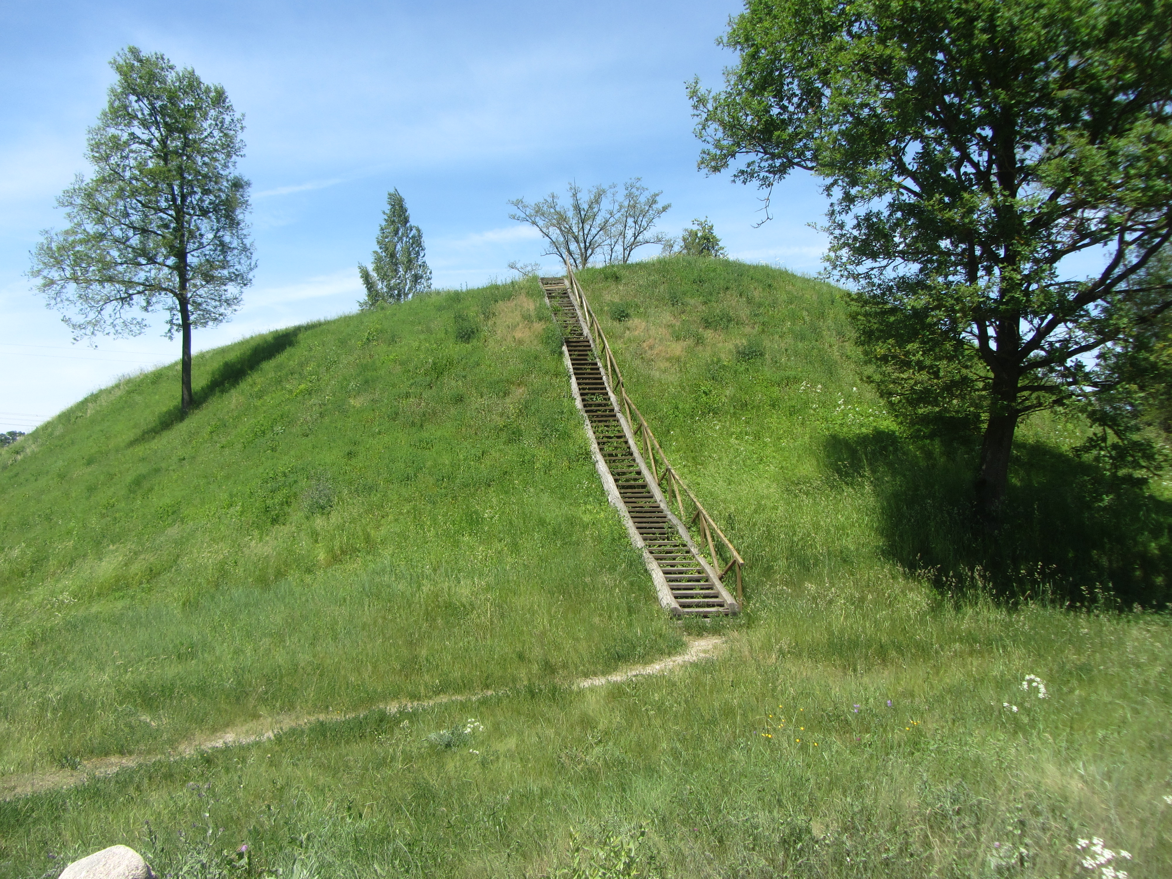 Butrimonių sen., Lithuania